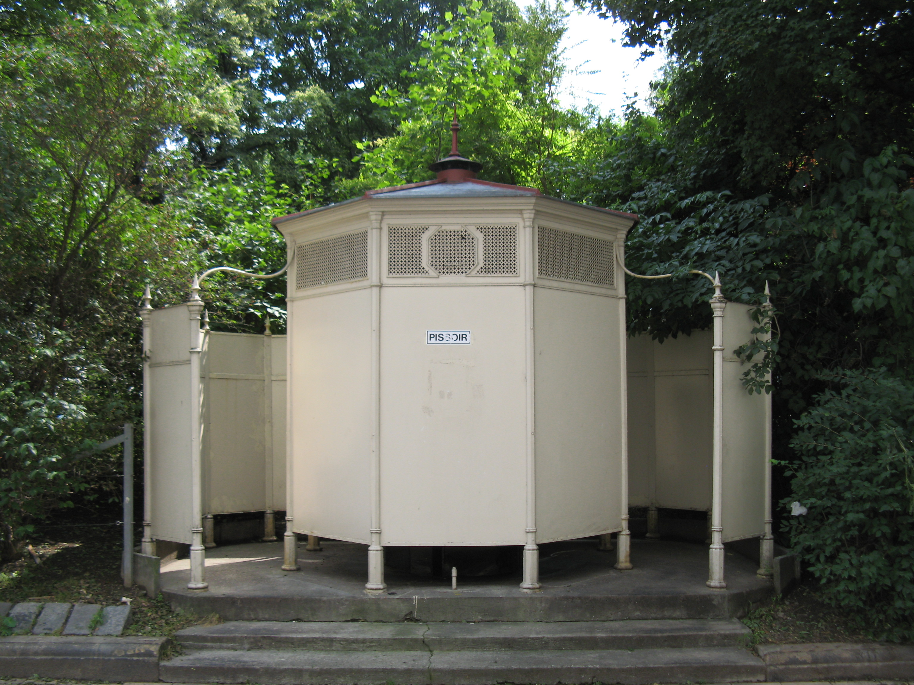 Puchsbaumpark, Puchsbaumplatz, Wien-Favoriten